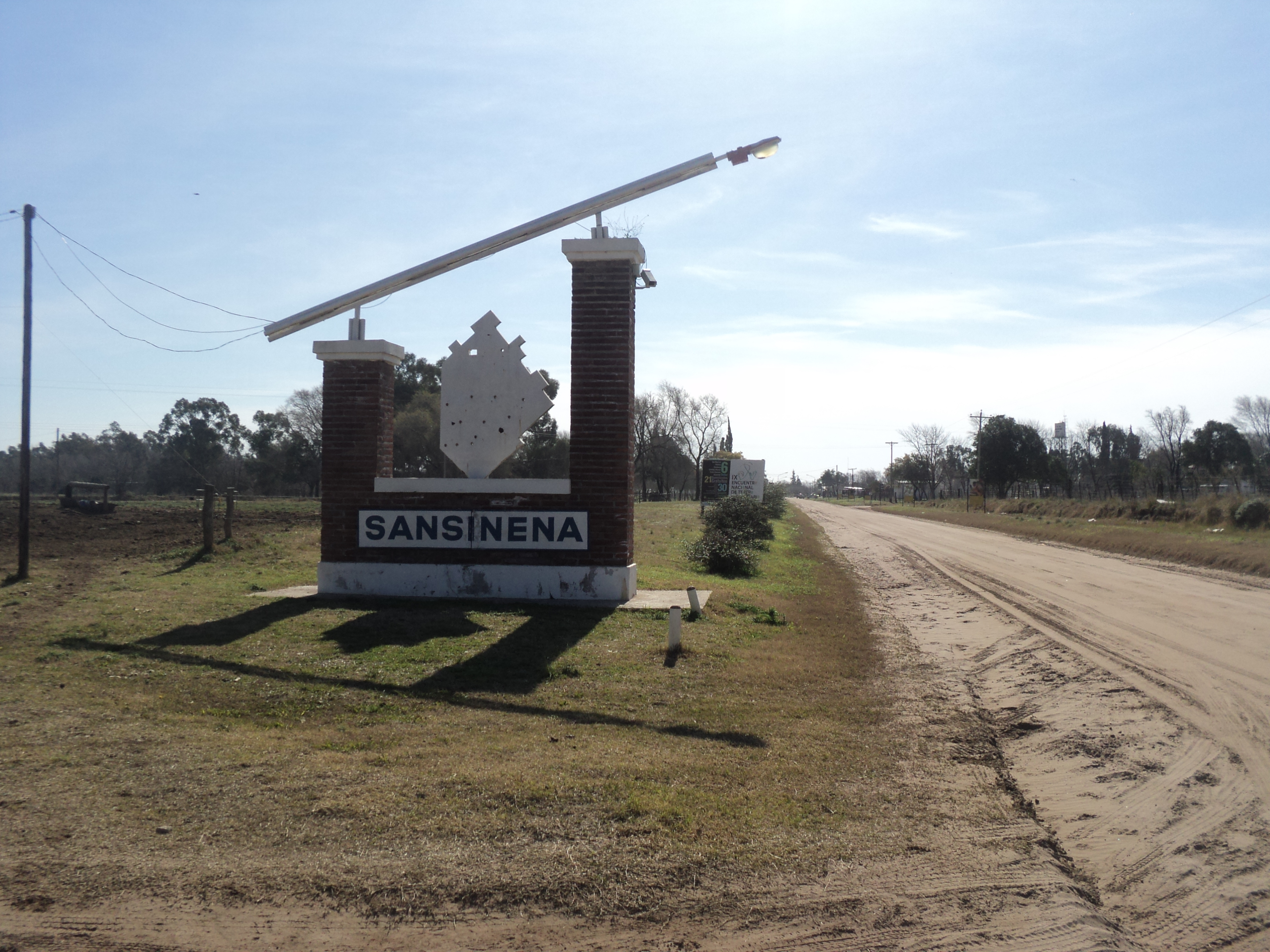 Arco de entrada a Sansinena